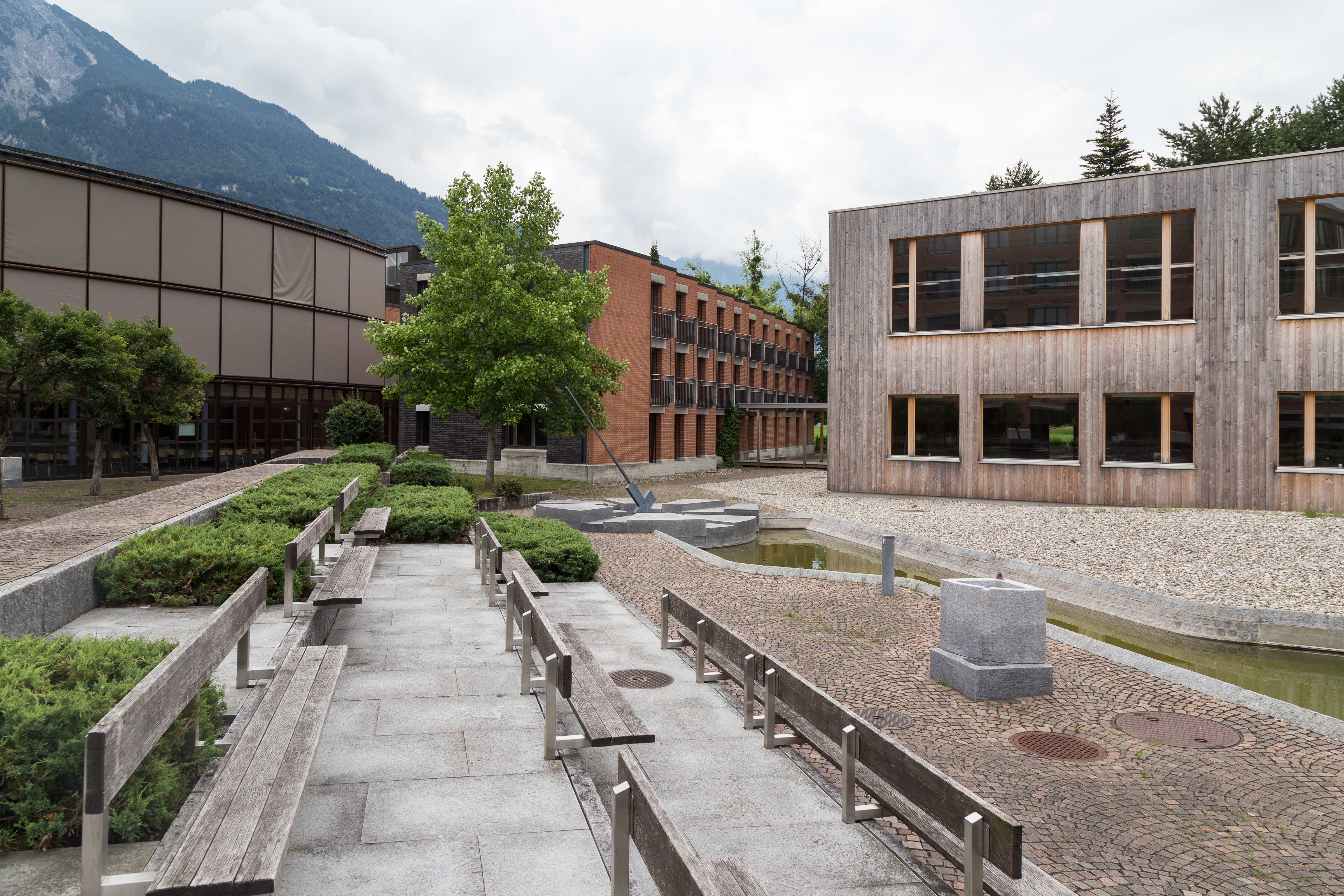 Liechtensteinisches Gymnasium Mühleholz I, Gebäude F, I & H in Schaan